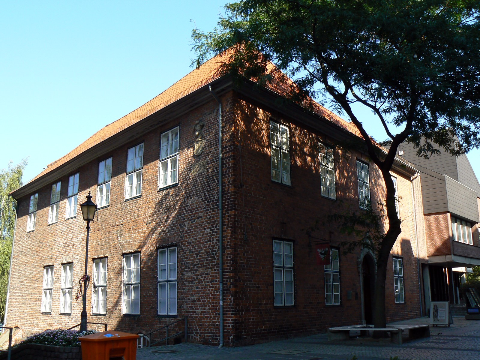 Warleberger Hof - Der einzig erhaltene Adelshof in Kiel. Erbaut 1616, seit 1970 Teil des Kieler Stadtmuseums.